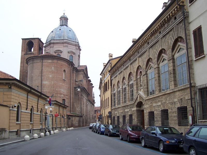 Mantova - Abside della Chiesa di S. Barnaba